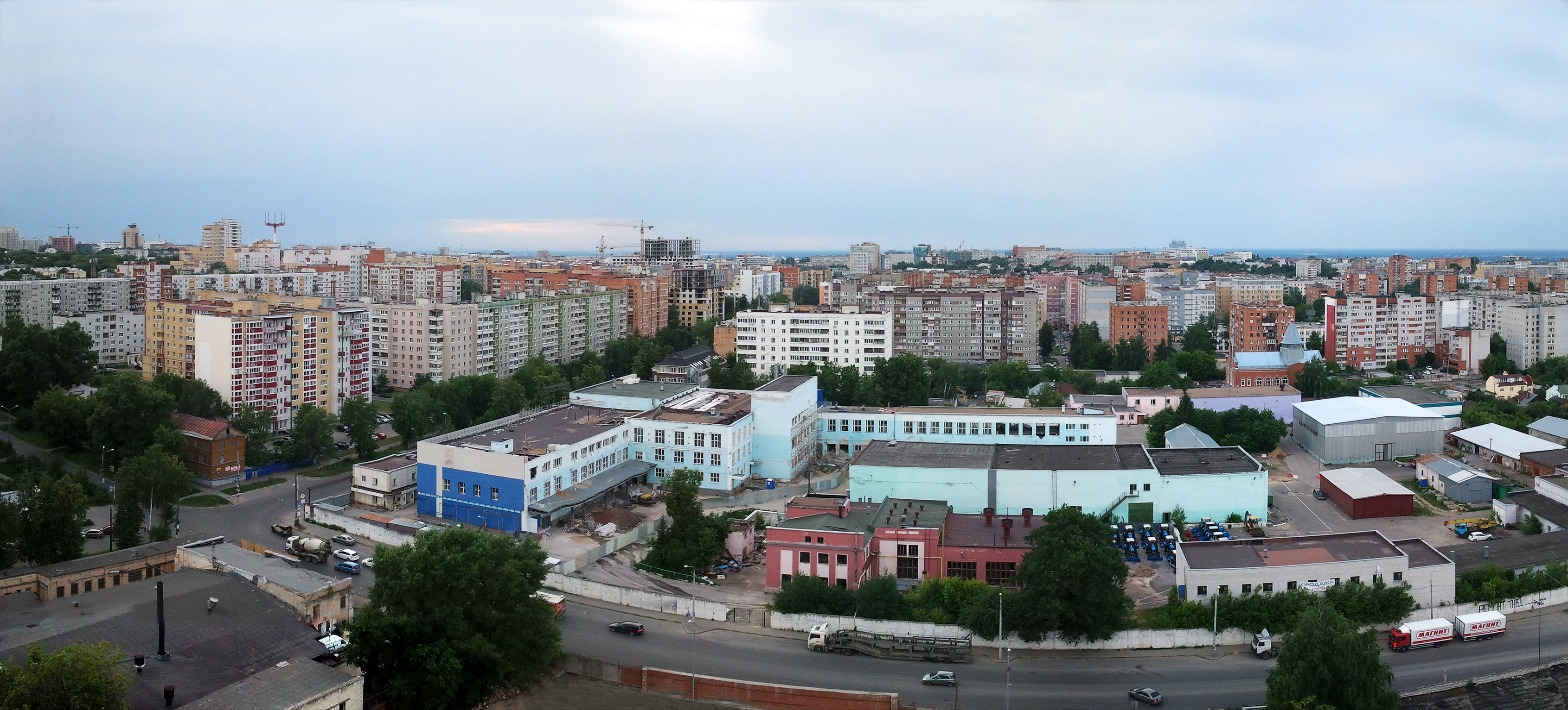 Нижний Новгород. Вид на Советский район. На переднем плане — корпуса Нижегородского завода шампанских вин.